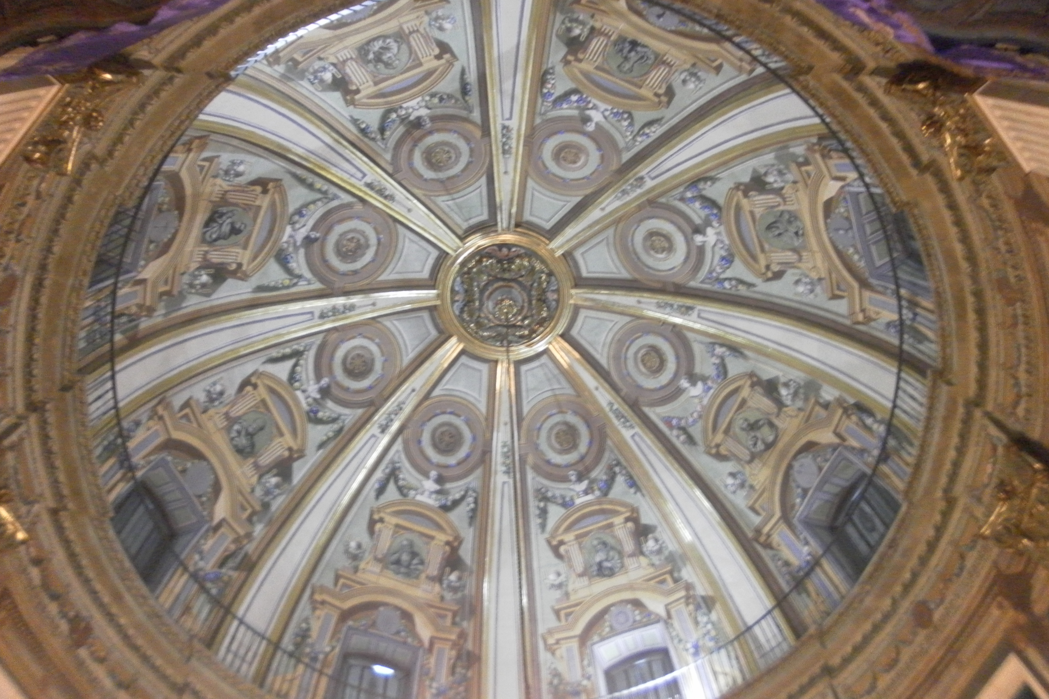 Imagen del interior de la cúpula de la Iglesia de Jesús (Murcia) con las pinturas en arquitectura fingida de Pablo Sistori.